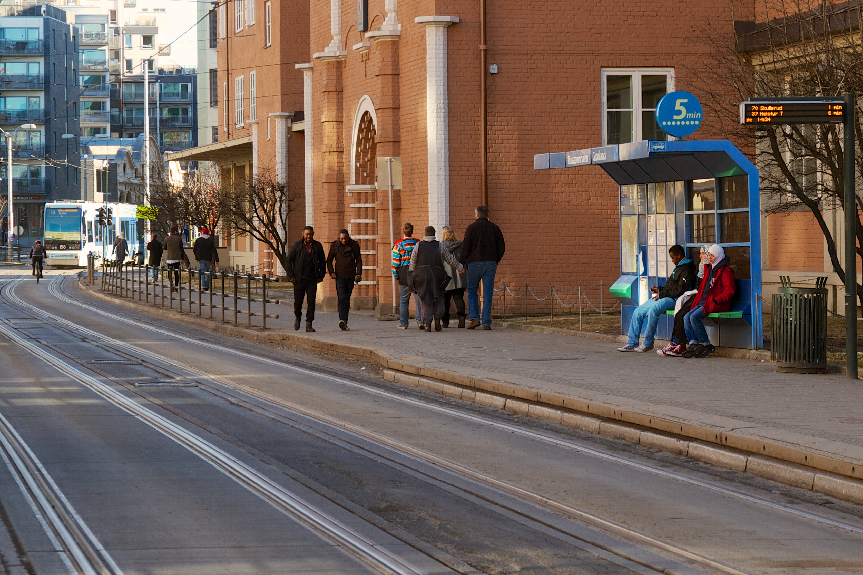 Bussterminalen Oslo holdeplass